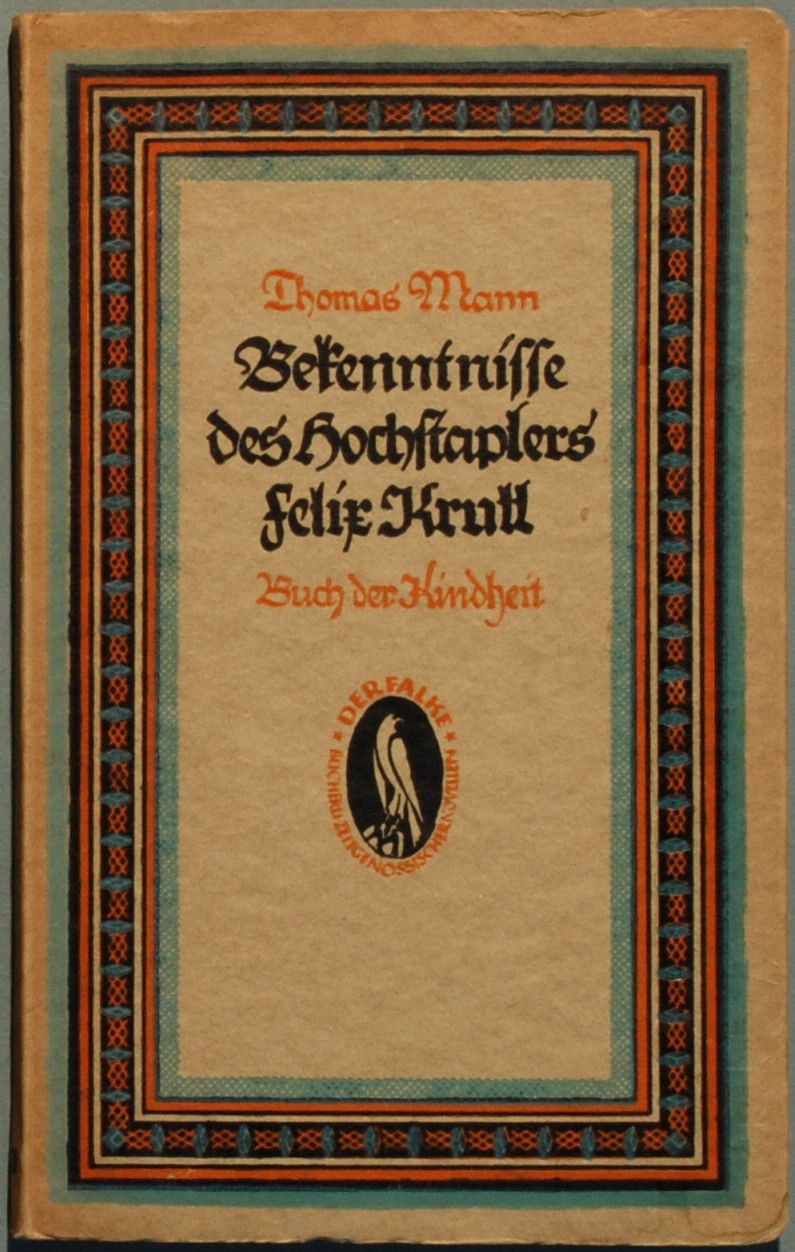 Mann, Thomas: Bekenntnisse des Hochstaplers Felix Krull. Buch der Kindheit. Berlin und Leipzig: Deutsche Verlagsanstalt Stuttgart 1923, 97 Seiten, Orig.-Pappband. Potempa D 12.1.2.